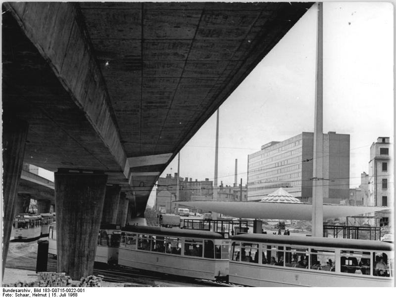 Halle, Hochstraße, Straßenbahn Zentralbild Schaar 15.7.1968 Halle-Thälmannplatz Eine moderne Verkehrslösung nimmt Gestalt an. Die Umgestaltung des Halleschen-Thälmannplatzes zeigt unser Foto. Hochstraße und Fußgängertunnels sind in Betrieb.